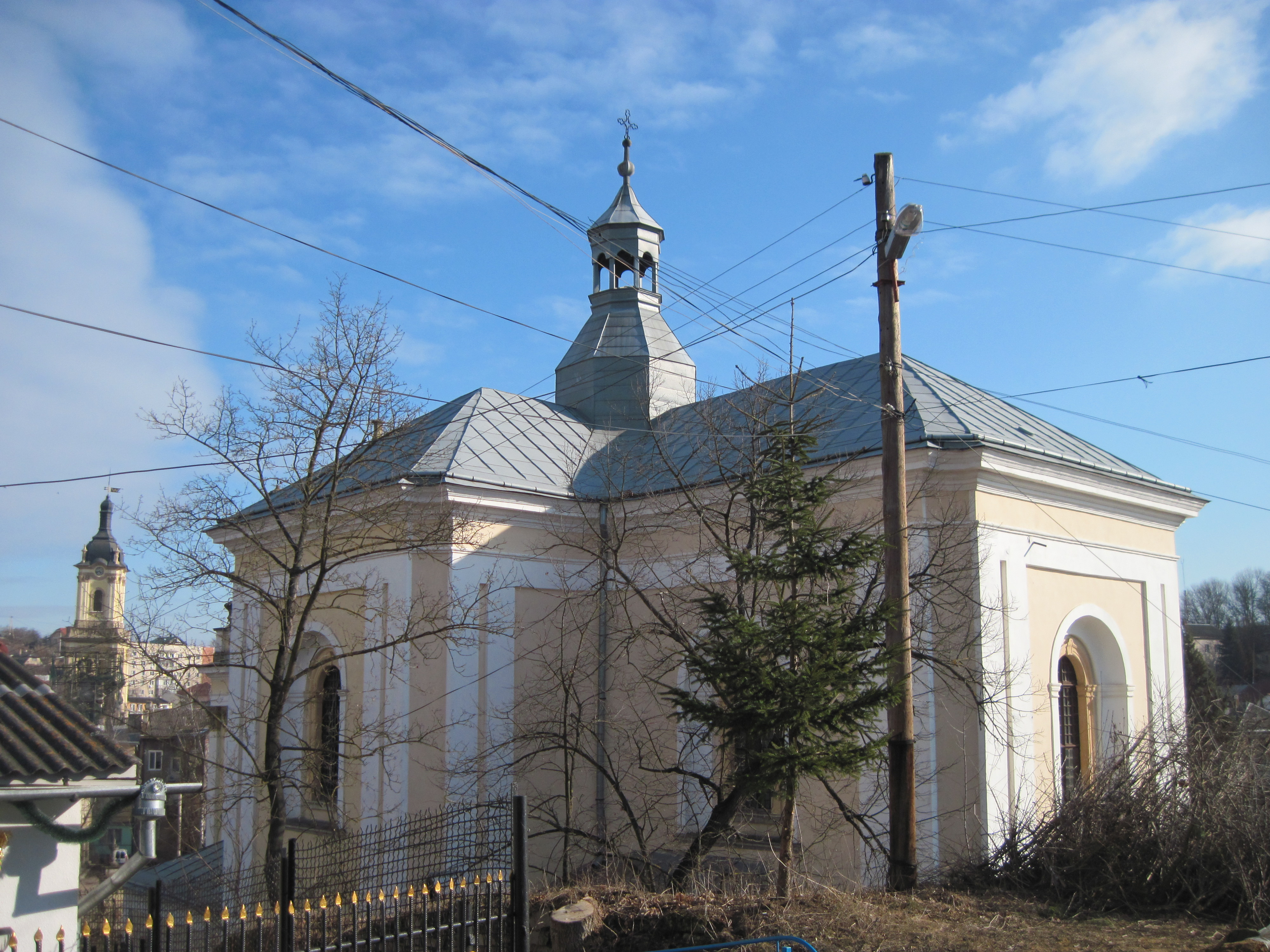 Костел Внебовзяття Пресвятої Діви Марії і ратуша, Бучач, лютий 2015